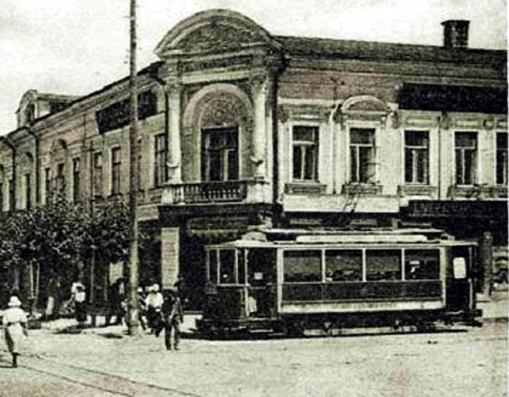 Трамвай на центральной улице Кишинёва